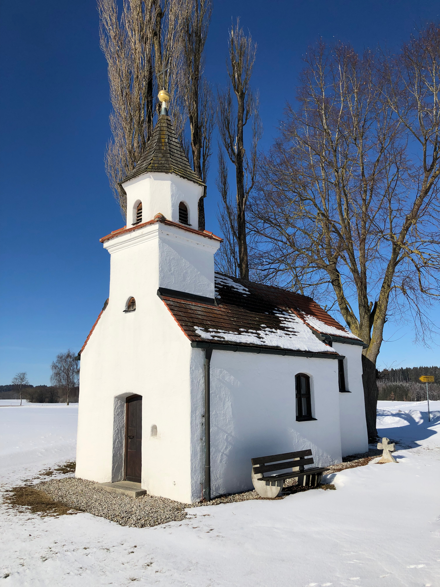 Ortsteil Dettenschwang des Marktes Dießen am Ammersee, Katholische Kapelle Maria Einsiedeln von Südosten, Landkreis Landsberg am Lech, Bayern, DE